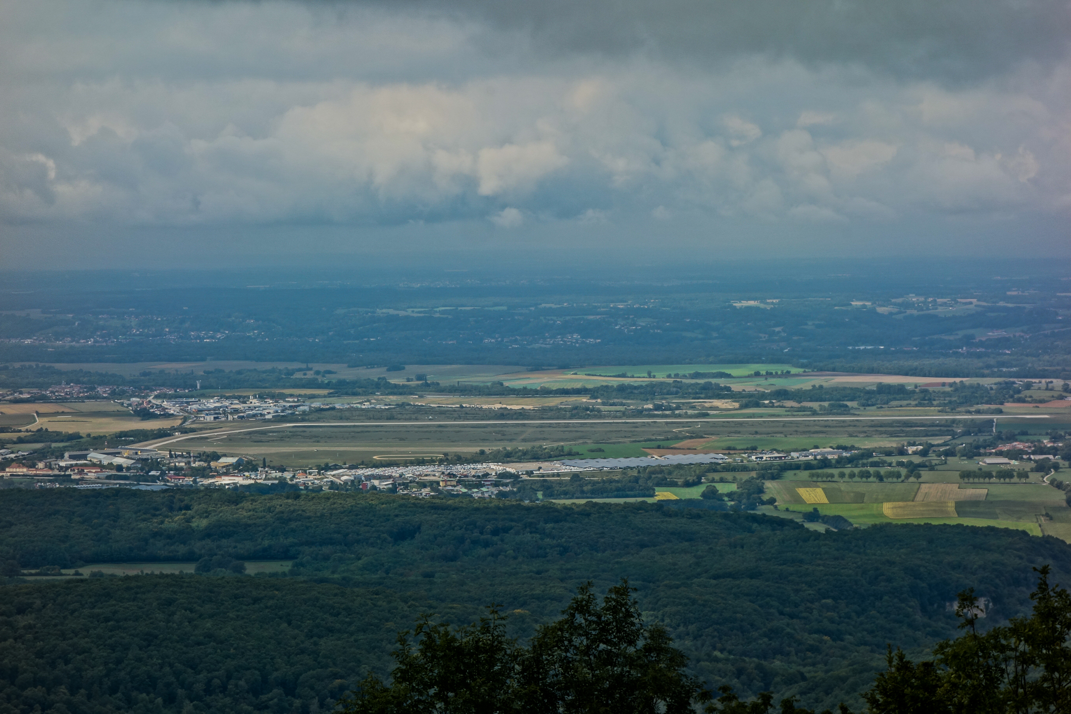 Base aérienne 278 vue depuis Mont Luisandre